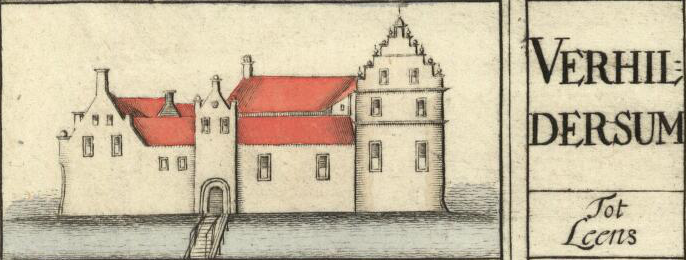 Verhildersum